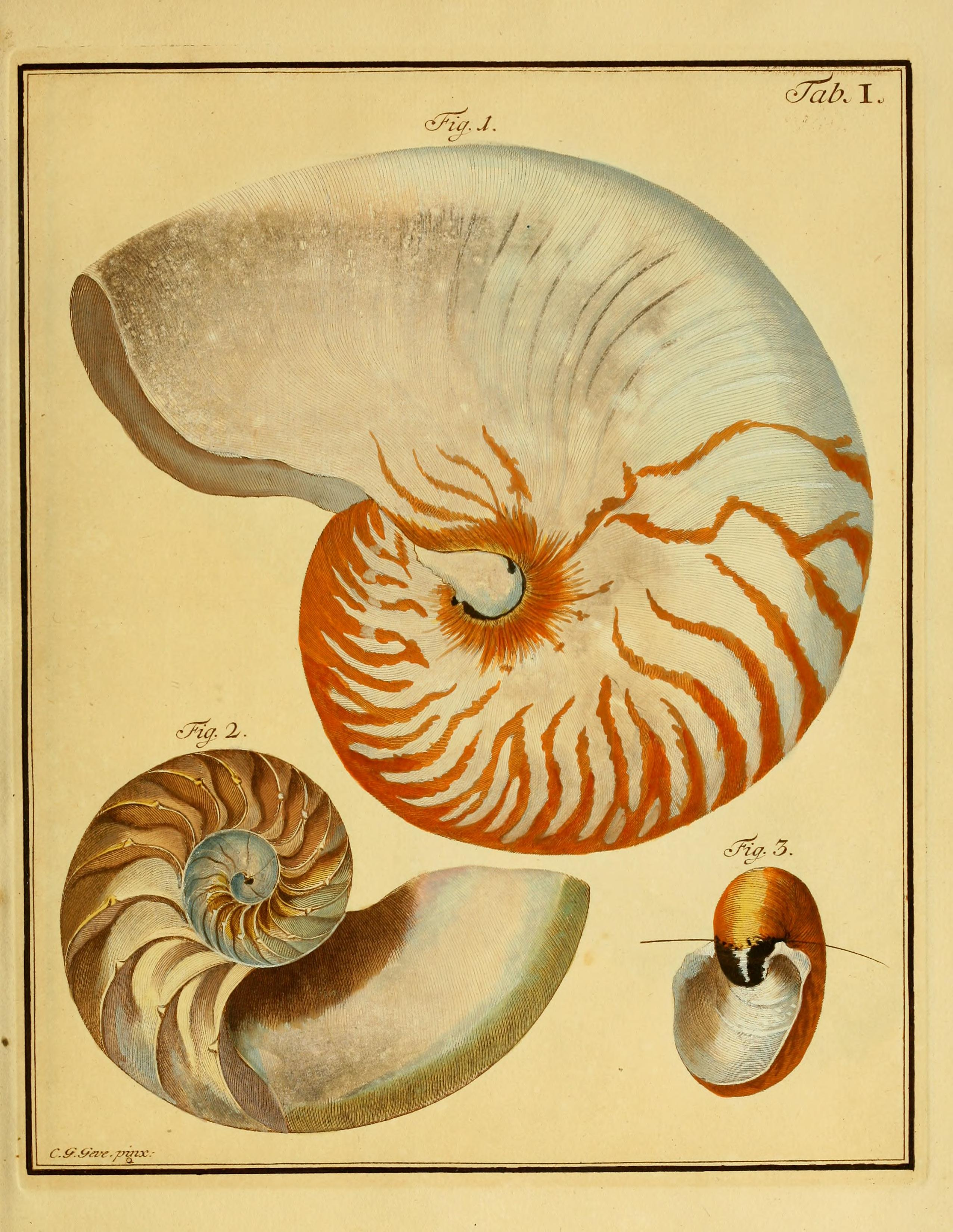 Belustigung im Reiche der Natur / Erster Band aus den Papieren des Verstorbenen vollendet durch Johannes Dominicus Schultze.